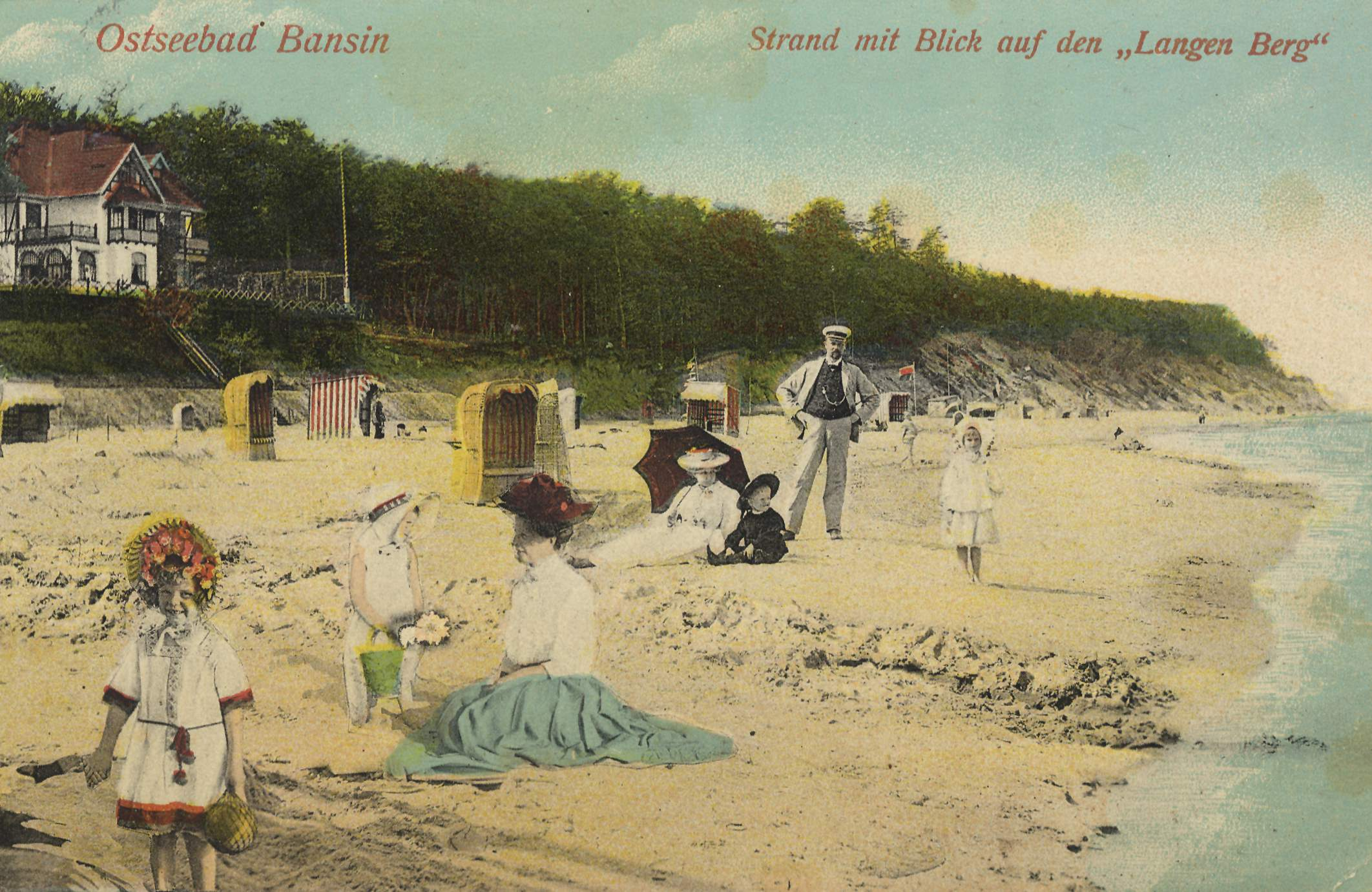 Ostseebad Bansin. Strand mit Blick auf den „Langen Berg“.